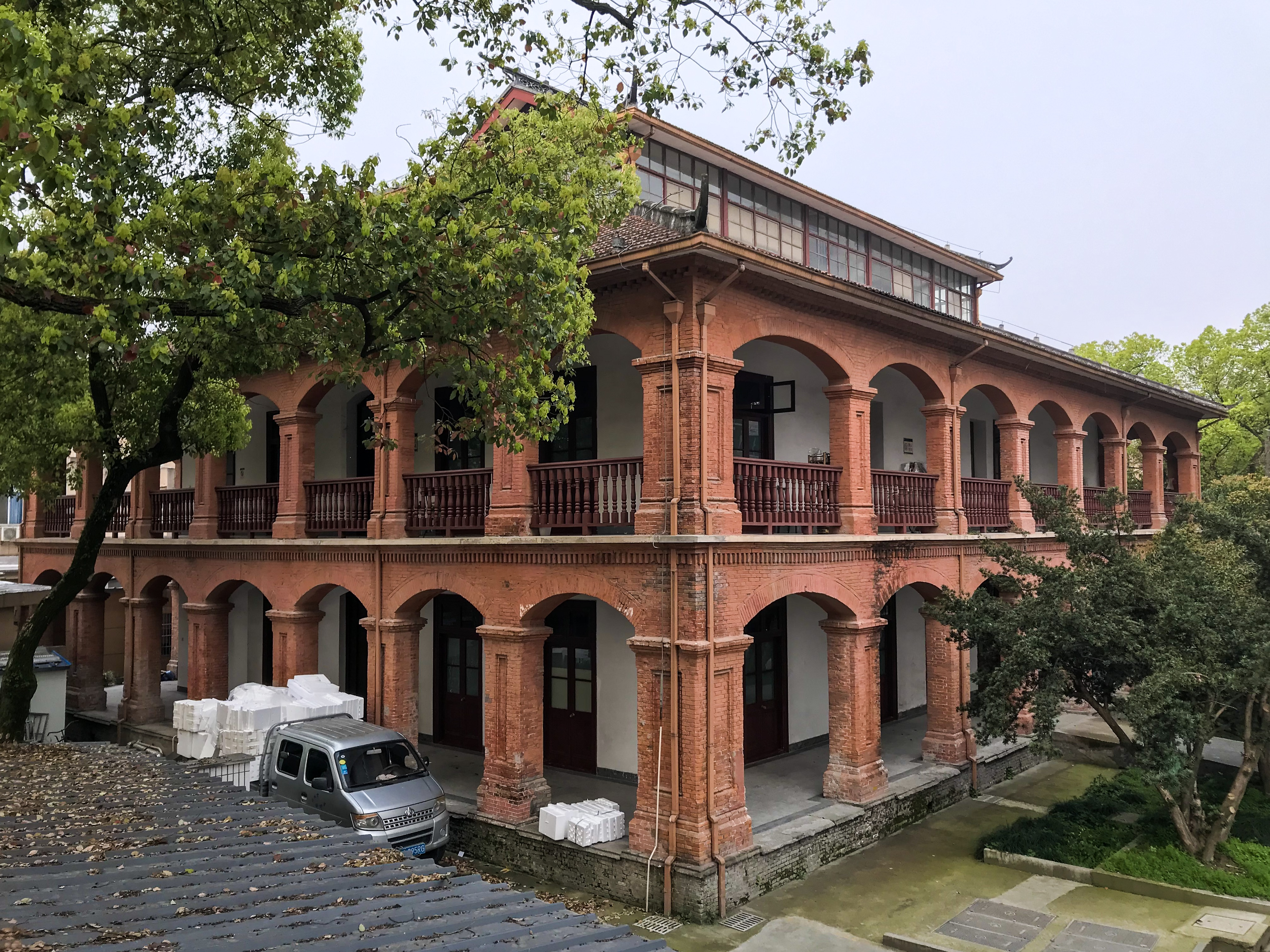 中文（中国大陆）: 杭州关税务司署旧址